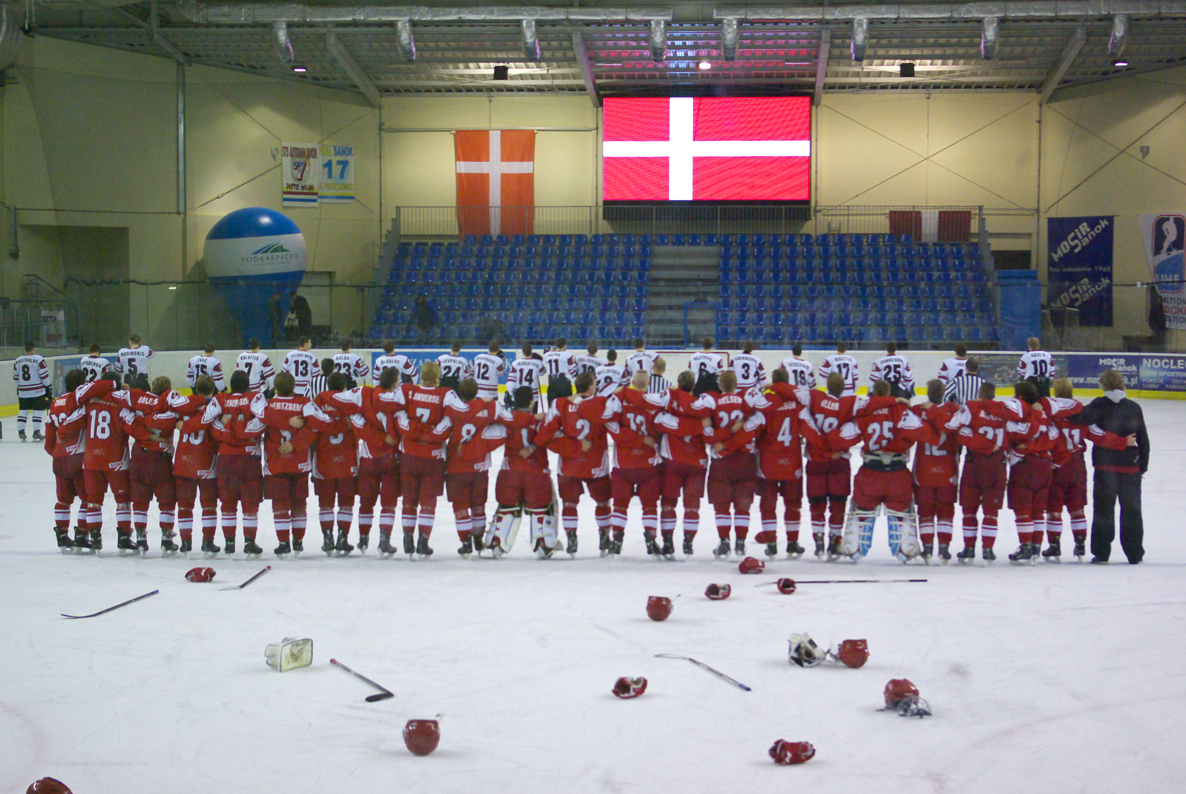 Hymn Danii podczas Mistrzostw Świata Juniorów w Hokeju na Lodzie 2014 I Dywizji w Sanoku, Dania - Łotwa 4:1, Arena Sanok 19 grudnia 201